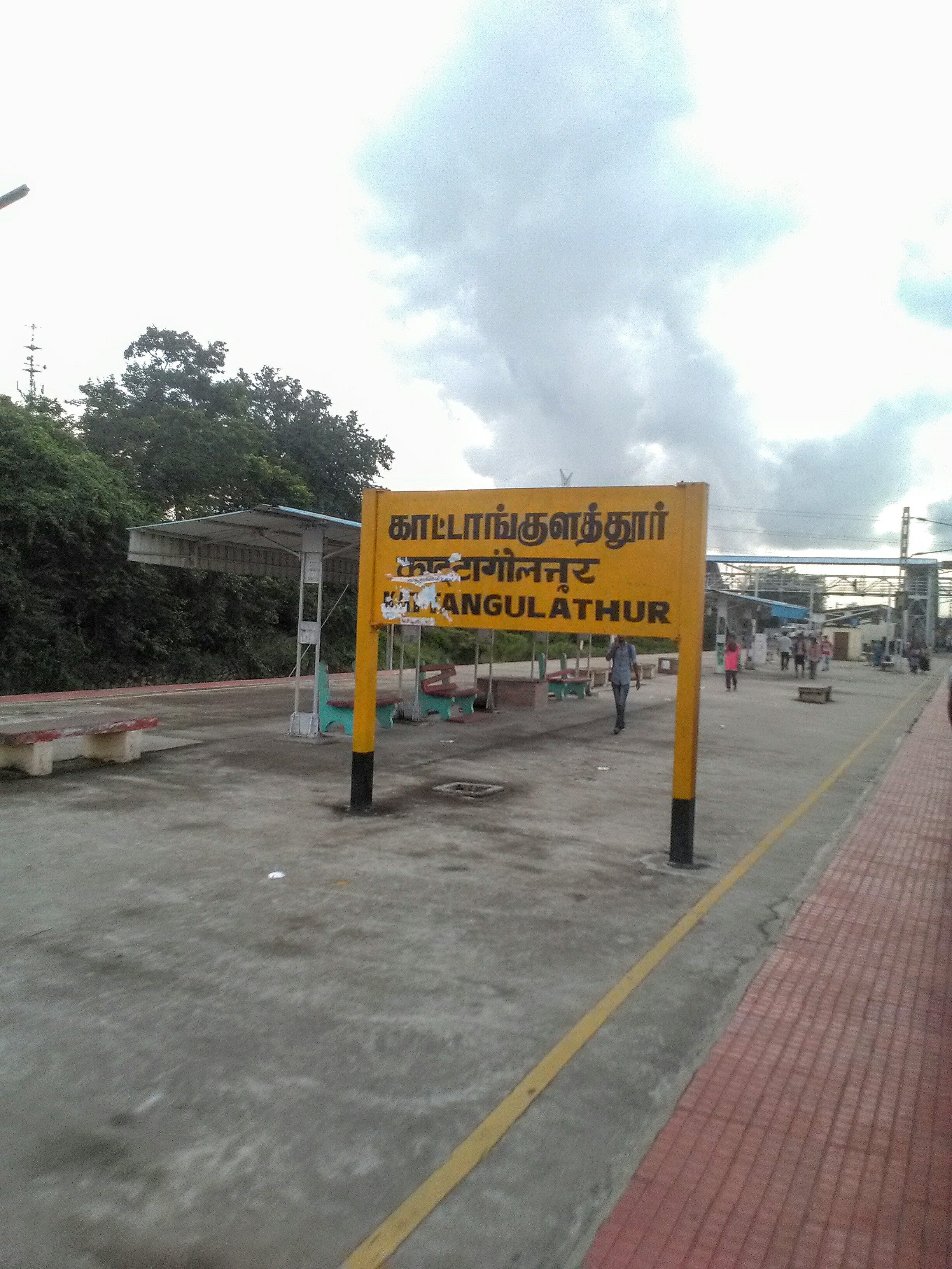 காட்டாங்குளத்தூர் இரயில் நிலையம் ..